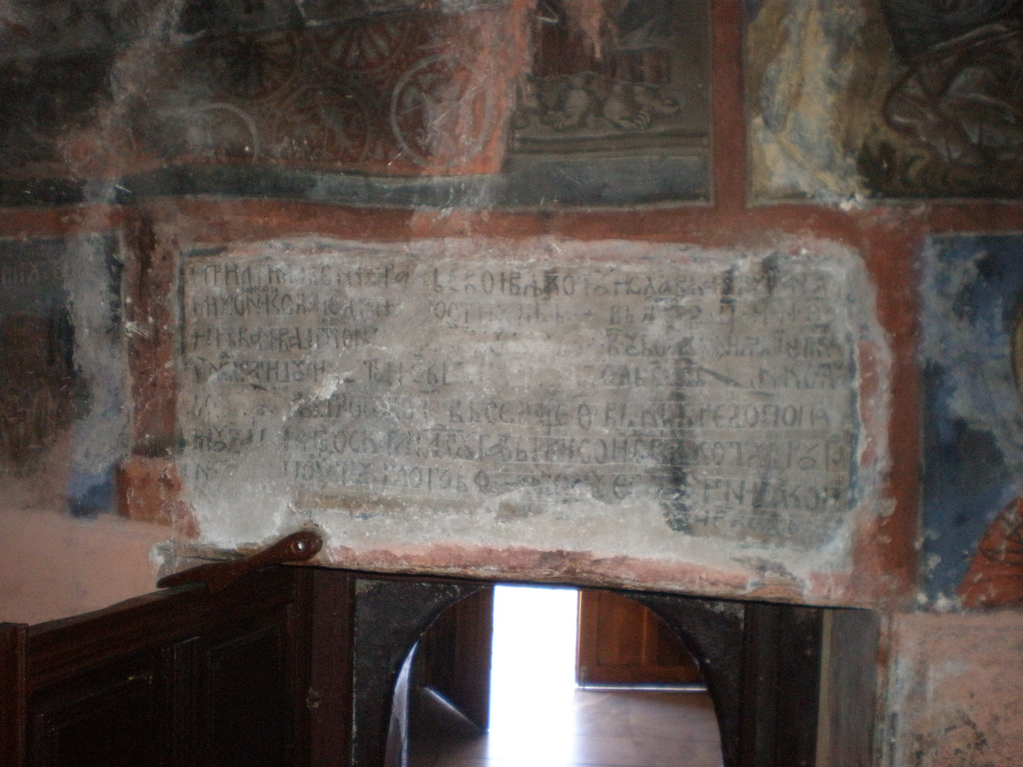 Натпис над влезот во црквата во Велестово